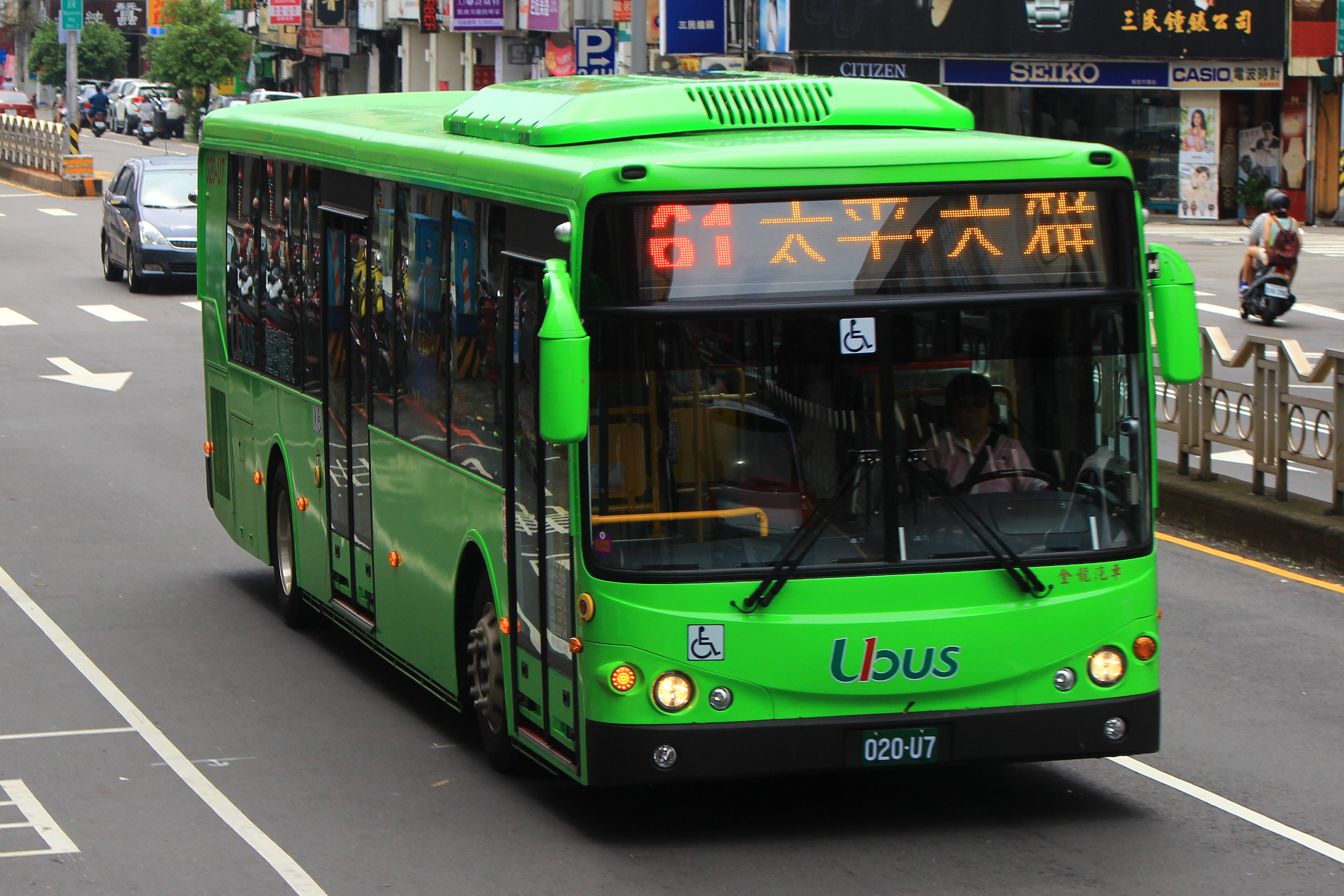 統聯客運020-U7行駛台中市公車61路